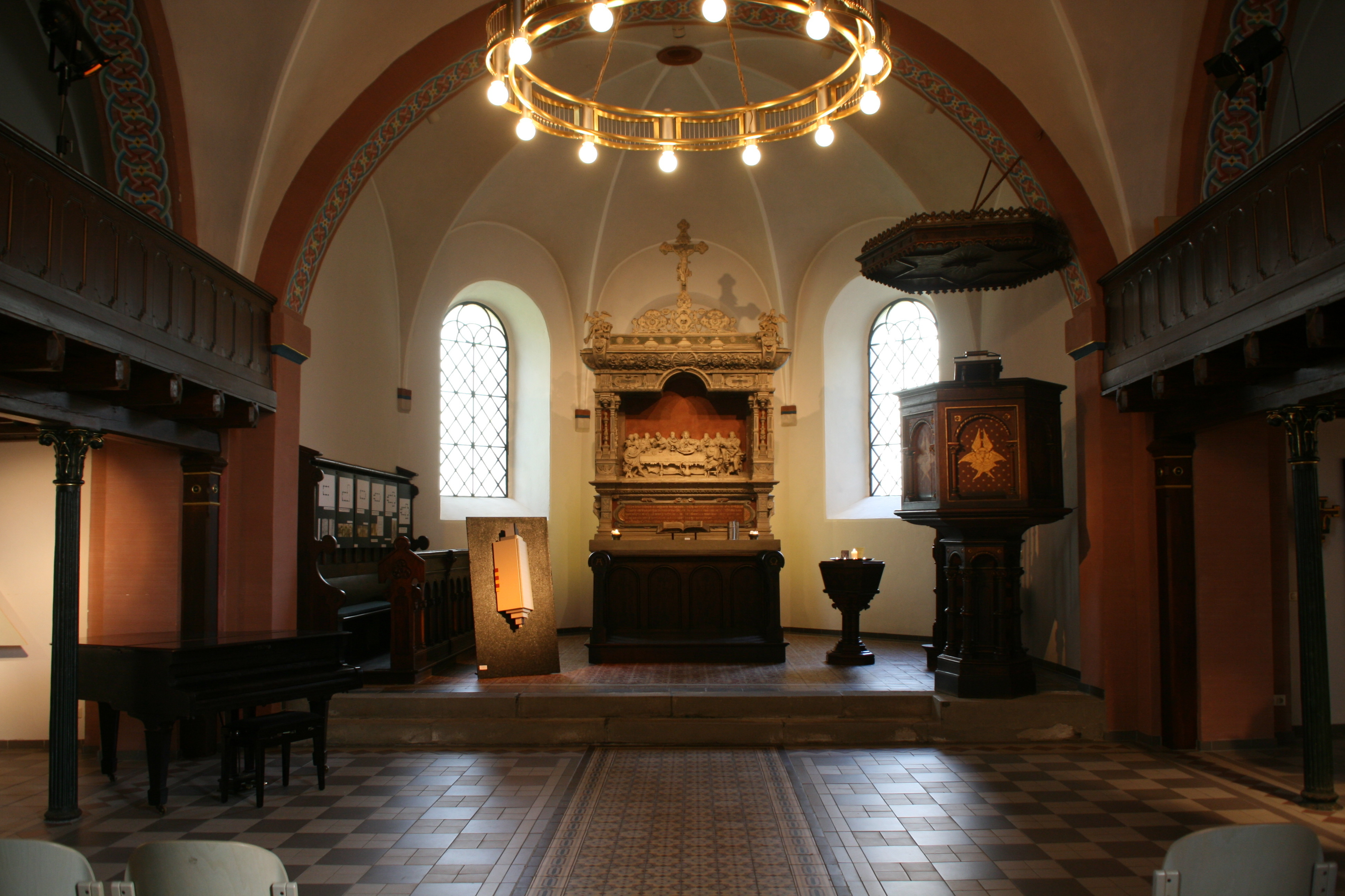 Bleckkirche, Bleckstraße 1 in Gelsenkirchen